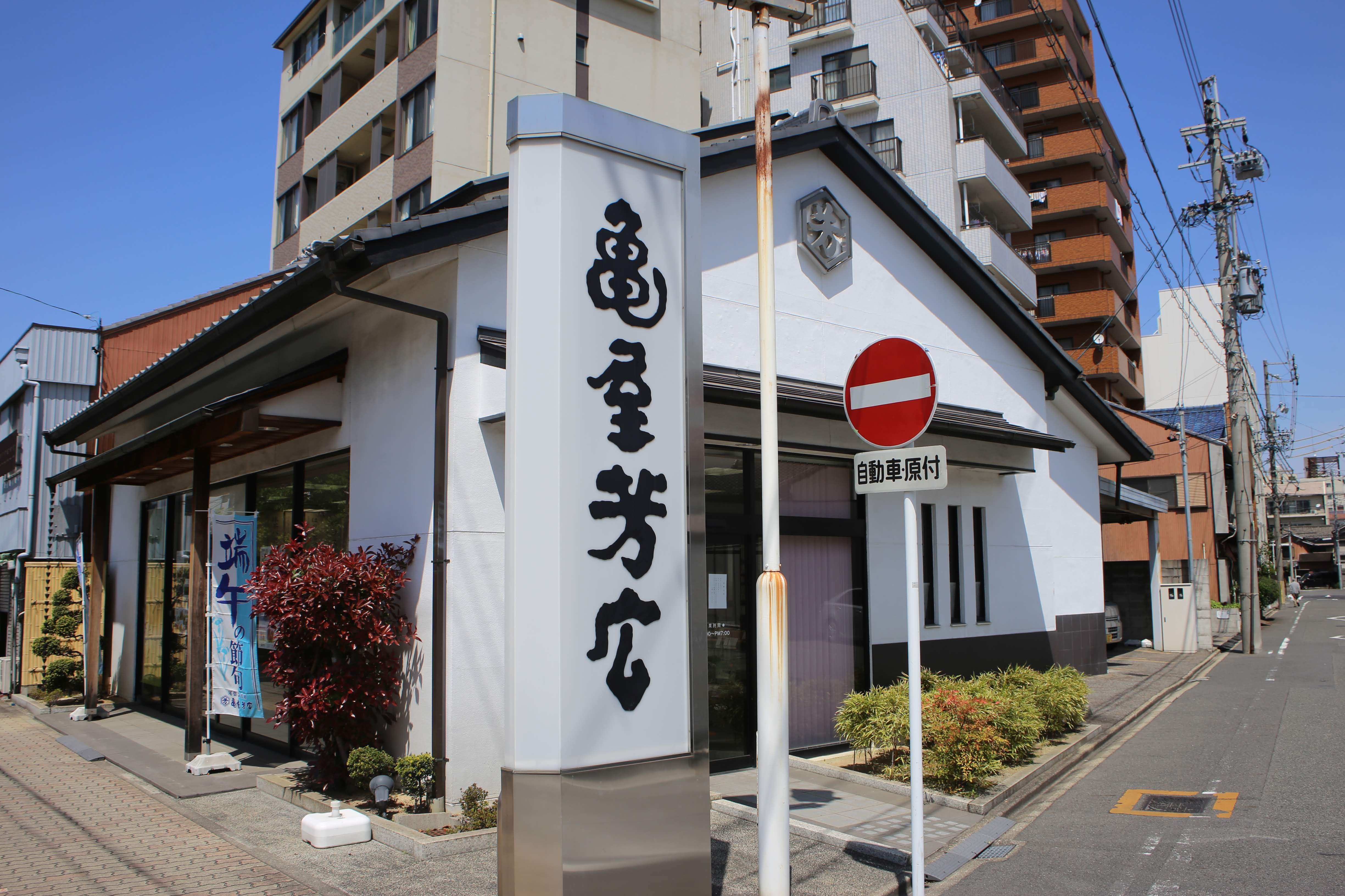 亀屋芳広尾頭橋店